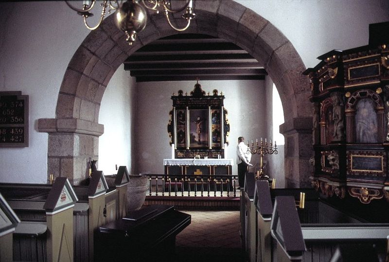 Durup Kirke, korbue og kor